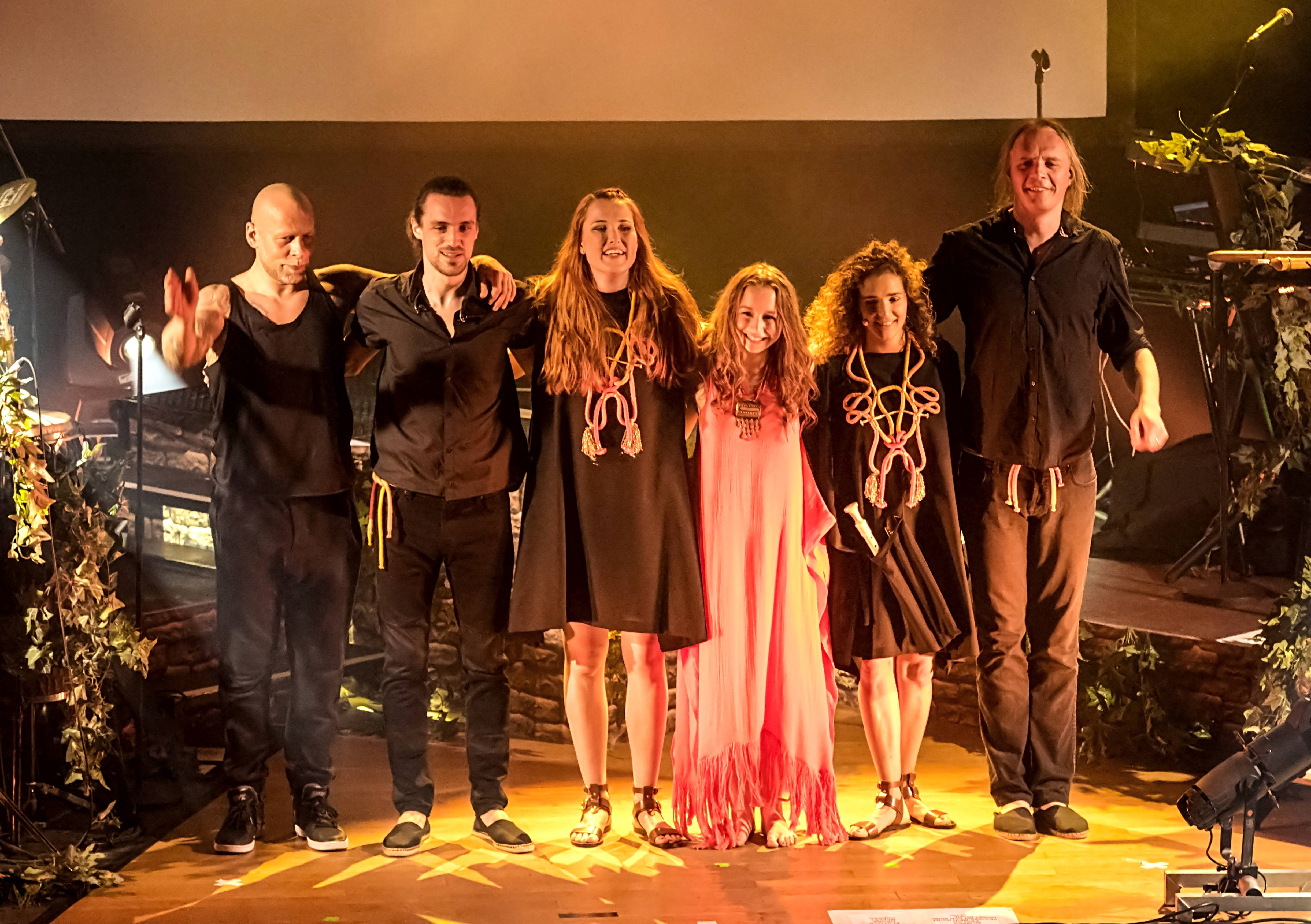 Konzertbilder aus Freiburg im Breisgau Das Konzert der Gruppe Oonagh am 30.04.2015 im Freiburger Paulussaal